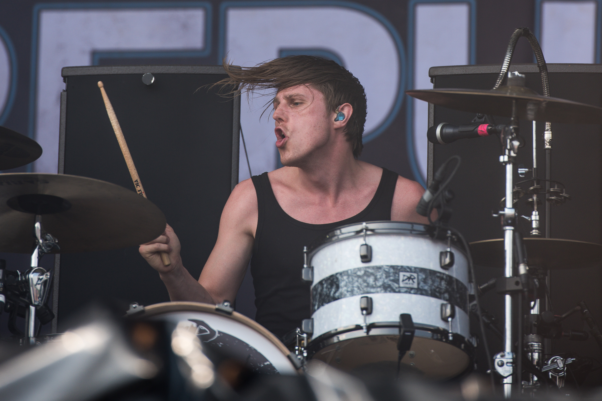 ARGO-Konzerte,Festival,Konzert,Livekonzert,Livemusik,Musik,Per Andreasson,RiP,Rock im Park 2015,Royal Republic,Seat Zeppelin Stage